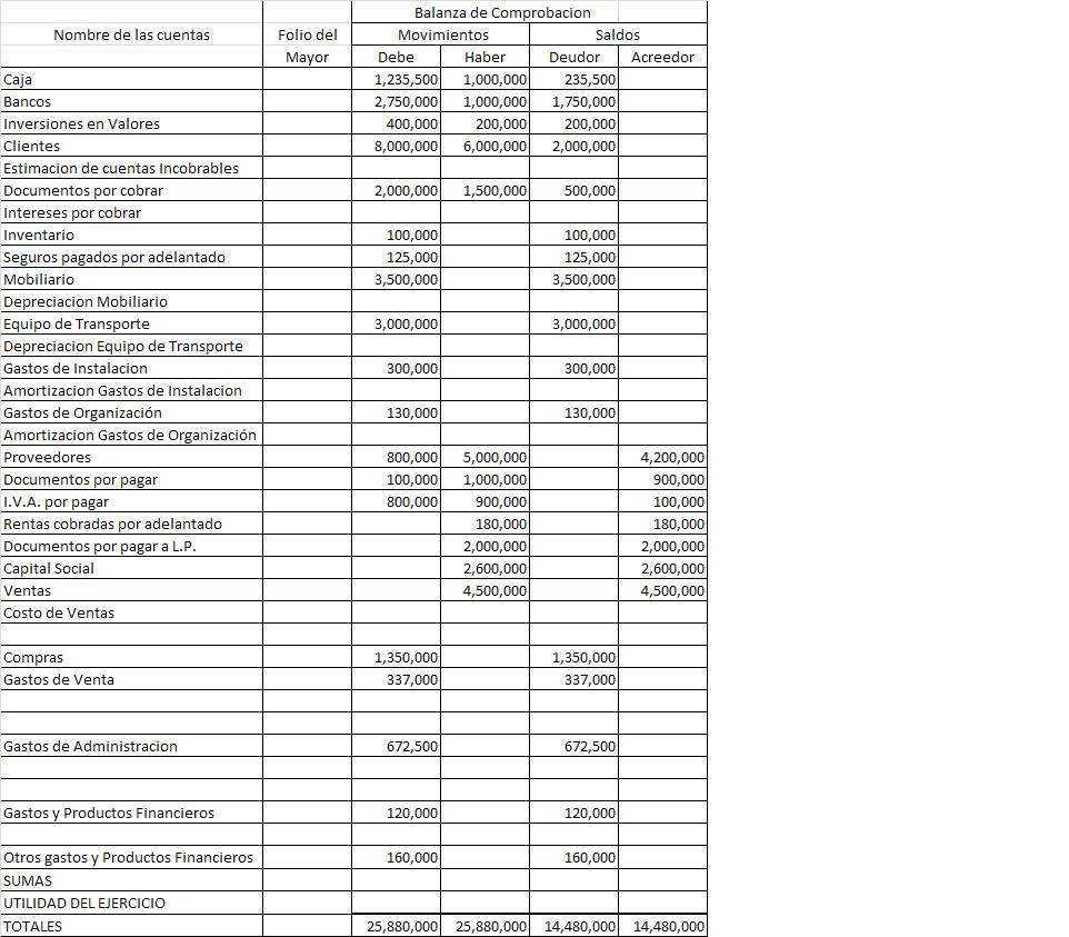 Balanza de comprobación, en ella se muestra las cuentas y saldos correctamente igualados en suma.